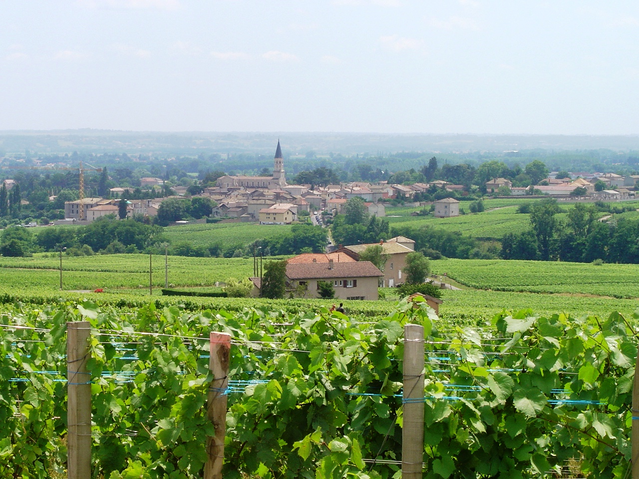 Romanèche-Thorins Foto von User:Ile-de-re aufgenommen am 28.06.2006